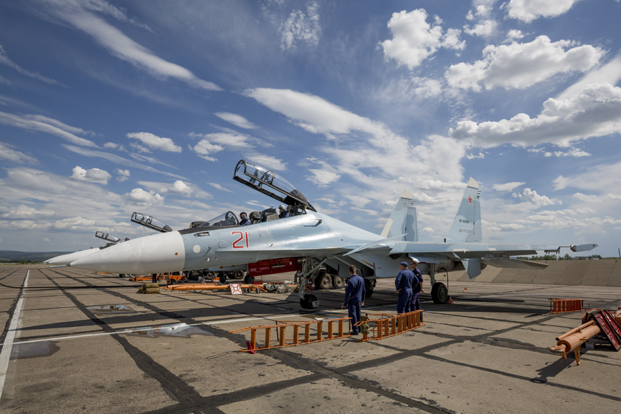 Истребители Су-30СМ 120-го отдельного смешанного авиаполка на земле и в небе: рабочие будни аэродрома Домна.